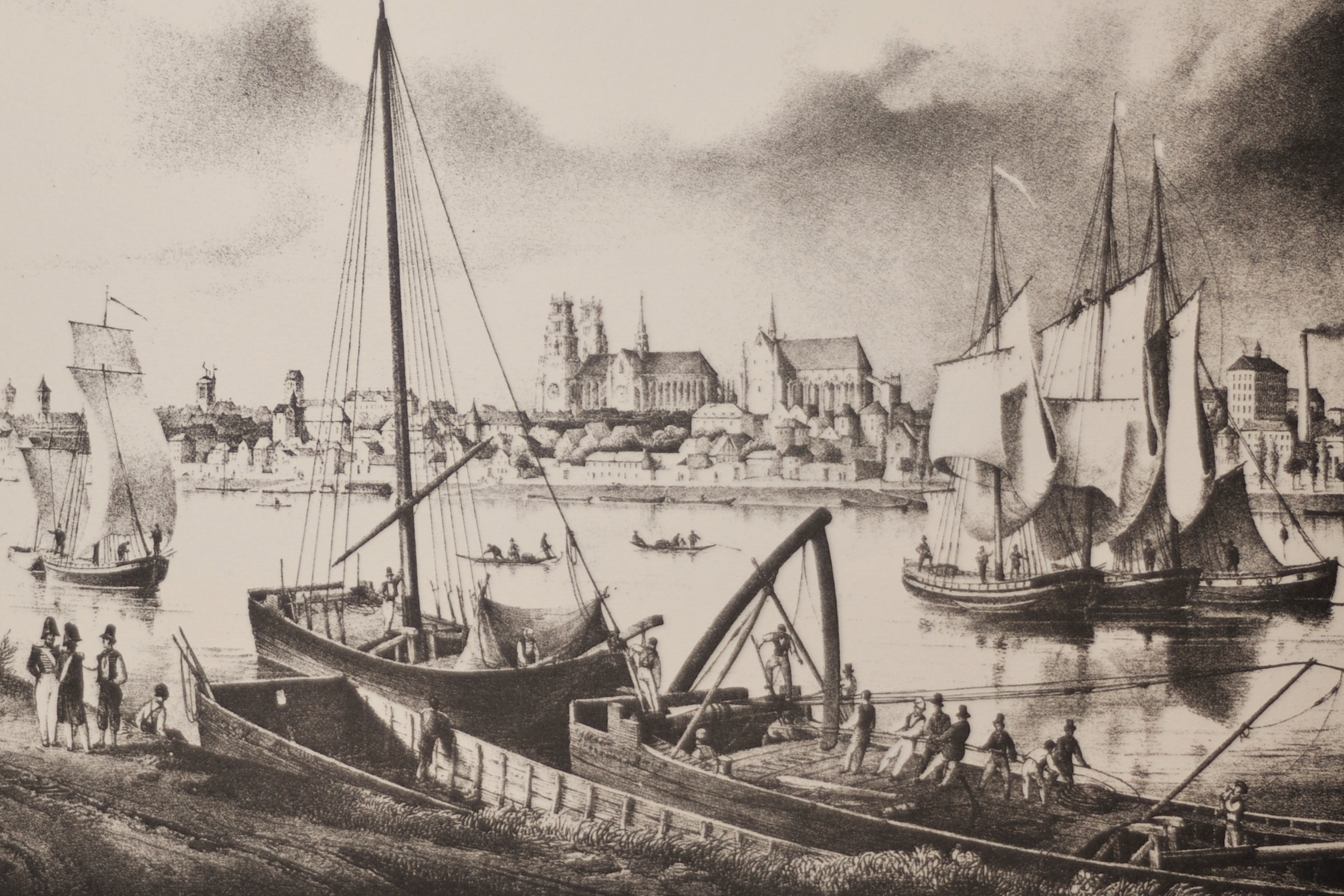 Détail de la « vue d'Orléans prise de la rive gauche de la Loire sur la levée des Capucins » dessinée d'après nature par Charles Pensée, en juin 1829, et présentant divers bateaux de Loire